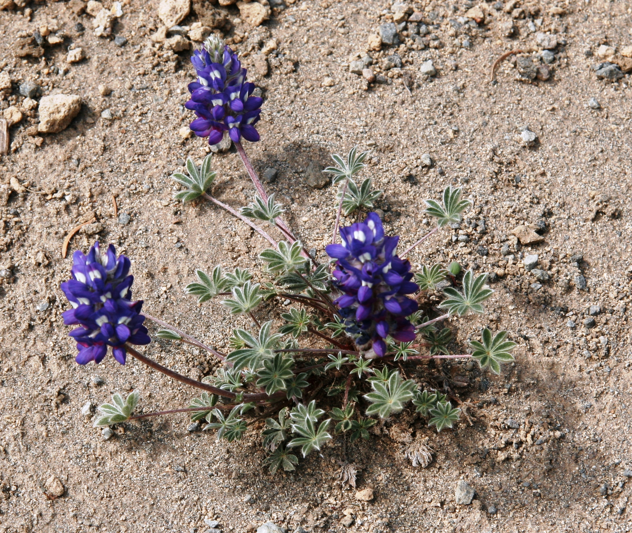 Dwarf Lupine Lupinus lepidus (syn. L. lyallii)